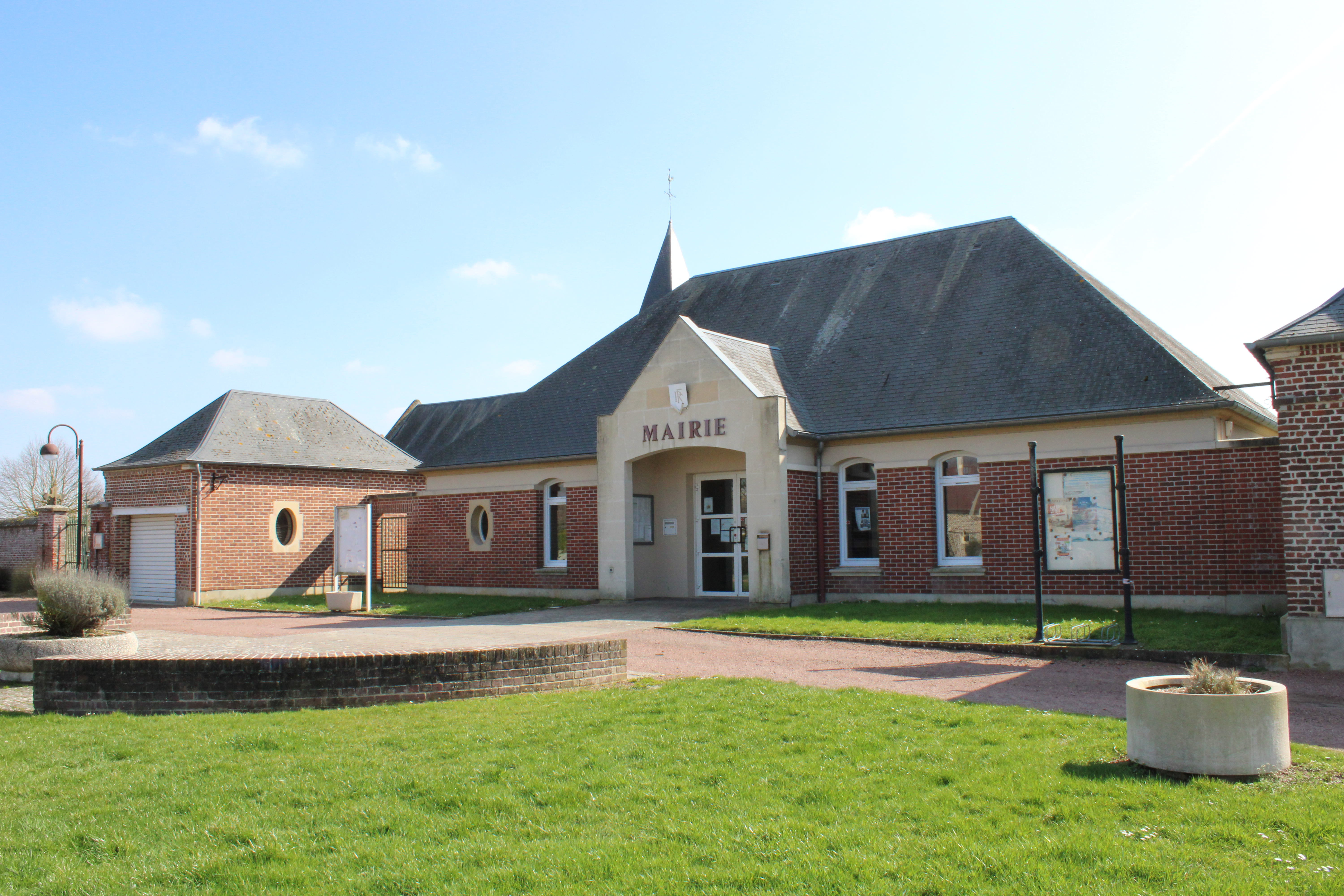 La mairie.